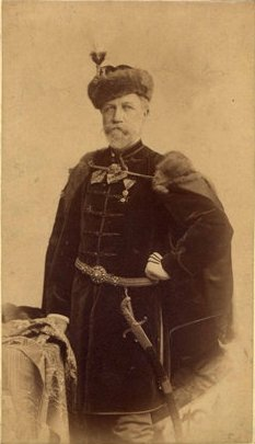 Jókai Mór (1825-1904) író kb. 70 éves korában díszmagyarban.